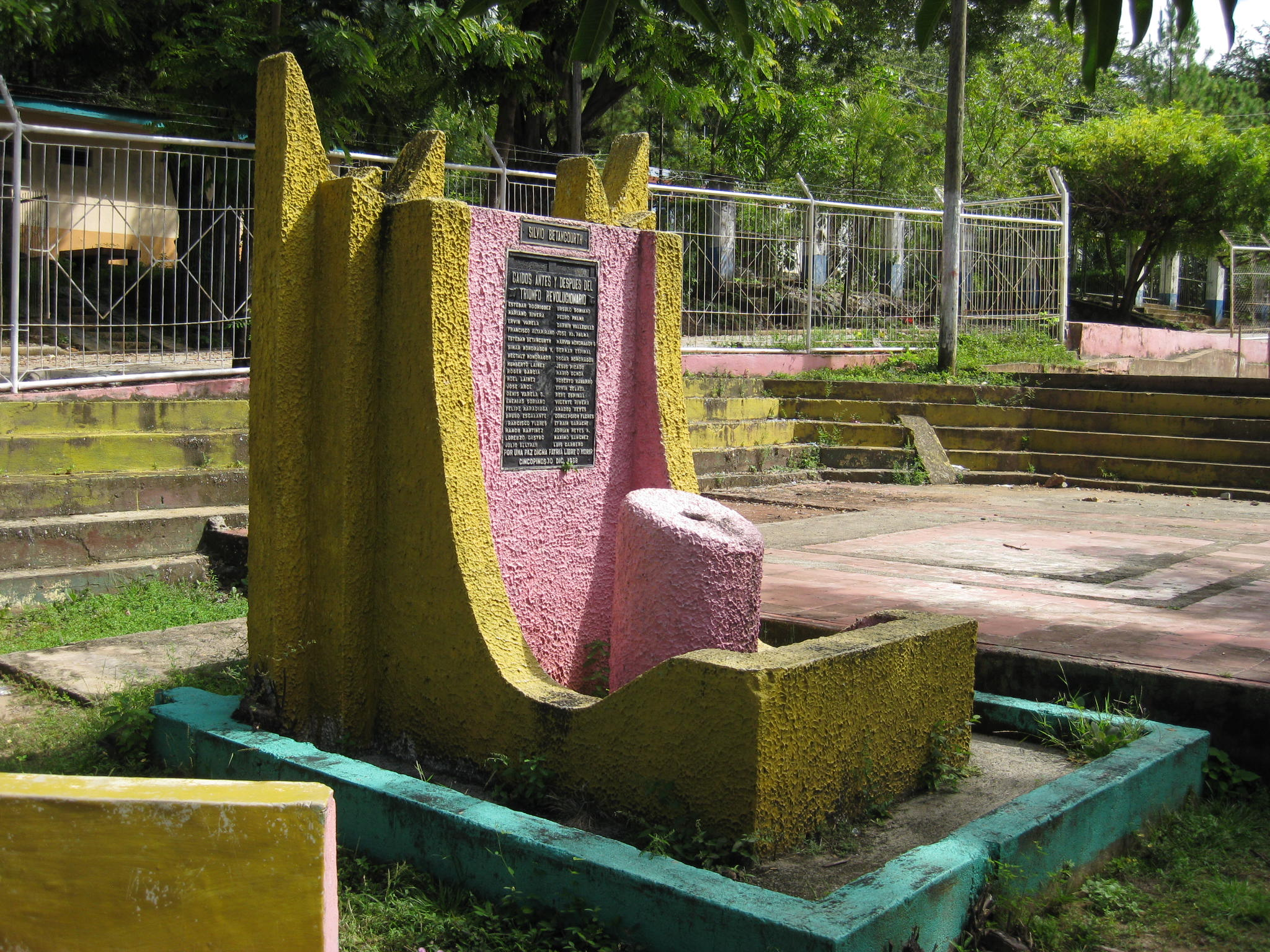 Hecha durante la administracion municipal de Henry Maradiaga V.